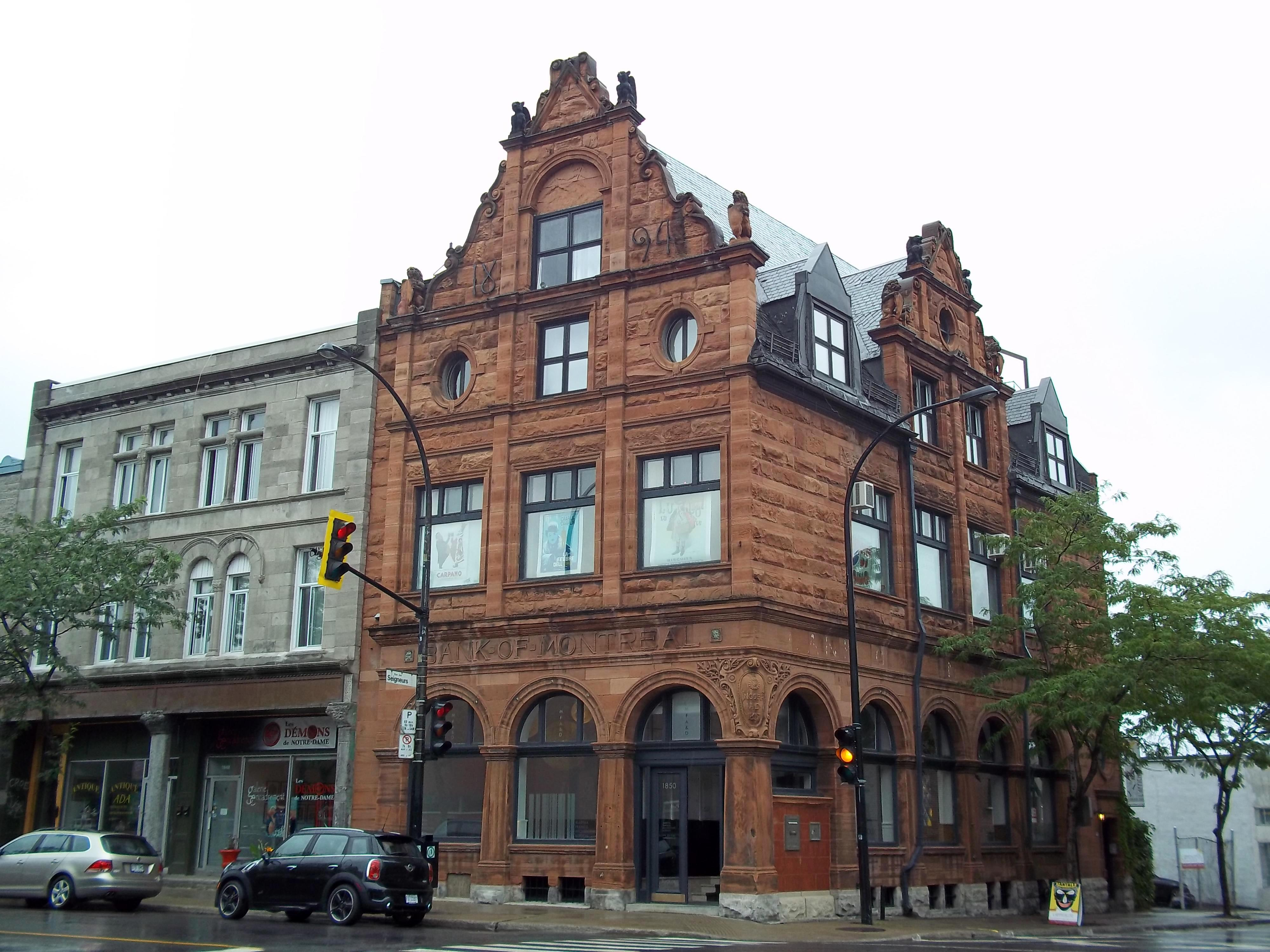 Banque de Montréal, 1850, rue Notre-Dame Ouest, Montréal Construction: 1894. On remarque que le bâtiment en grès rouge d'Écosse, a conservé son aspect d'origine quoi qu'il ait perdu quelques ornements au niveau des pignons de la toiture. Des aiguillons ont été retirés. Comparatif de 1900-10: Grand répertoire du patrimoine bâti de Montréal Description